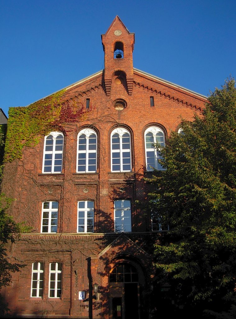 Budynek Bernardyńska 6 Bydgoszcz, Wydział Rolniczy UT-P